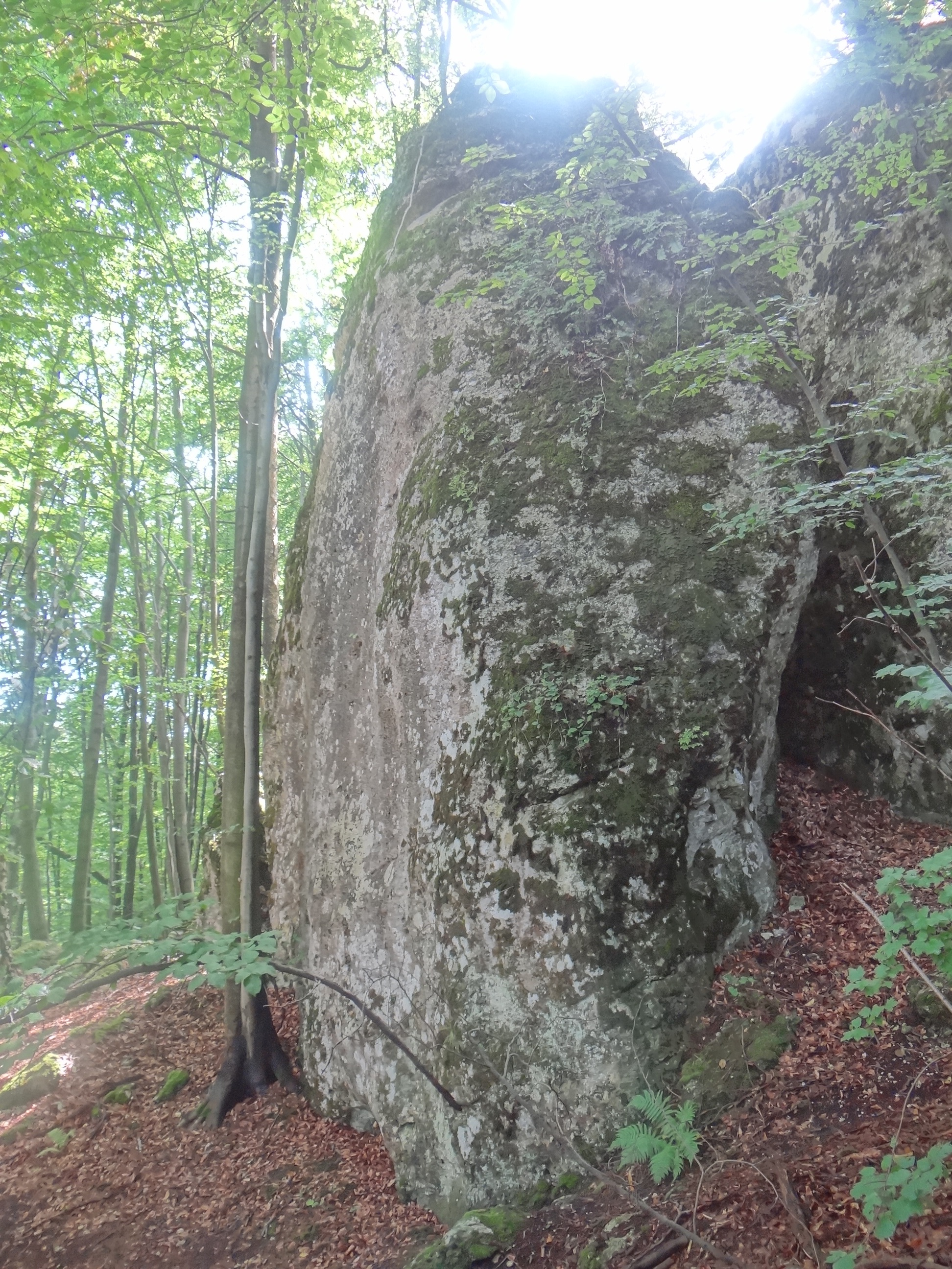 Skała Piramida w grupie Skał Kroczyckich naWyżynie Częstochowskiej